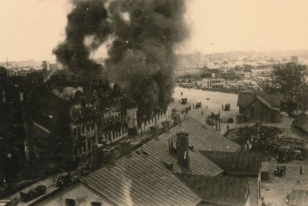 Беларуская (тарашкевіца): Менск (Miensk), вуліца Захараўская (vulica Zacharaŭskaja) у бок шляху Каралеўскага (šlach Karaleŭski)